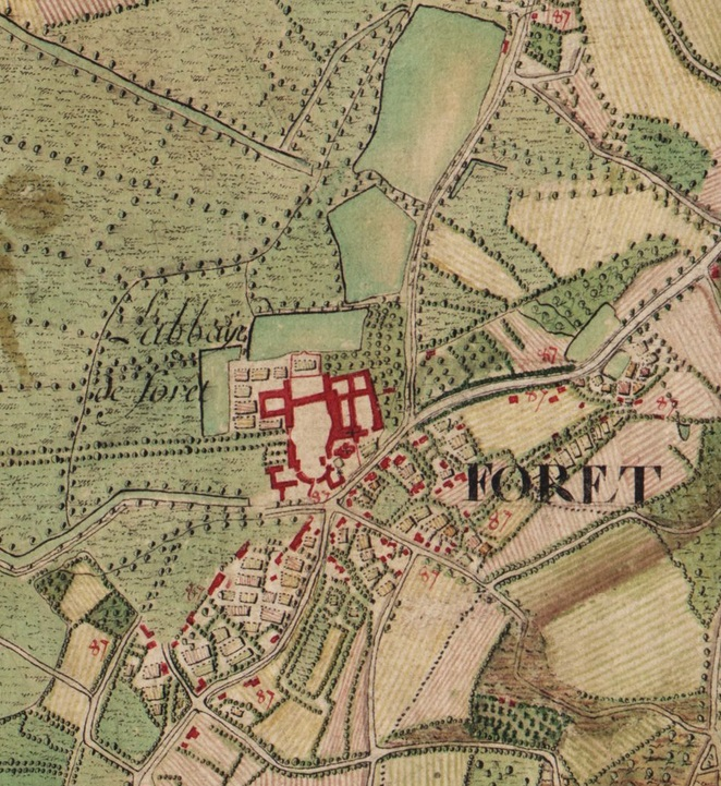 Extrait de la carte de Ferraris n° 77A